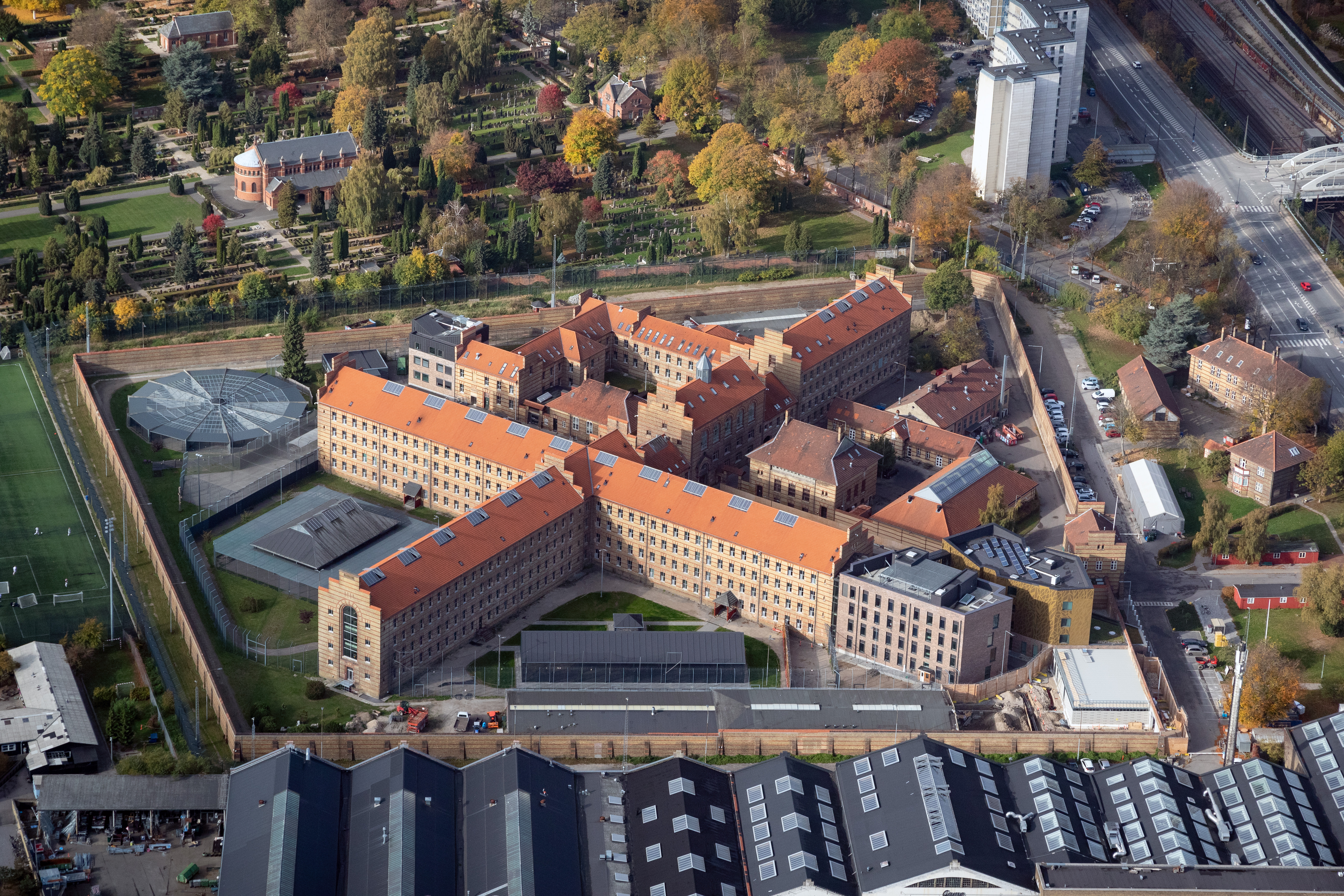 Vestre Fængsel in Copenhagen, Denmark